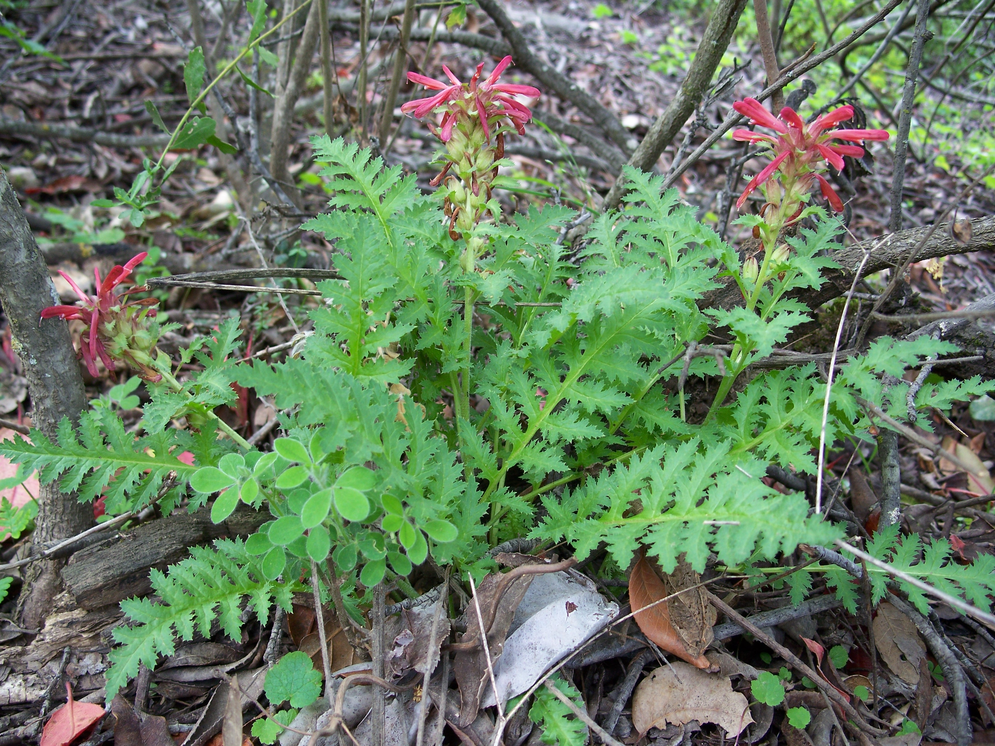 Pedicularis densiflora Made in Saratoga, California. Identified by Franz Xaver.